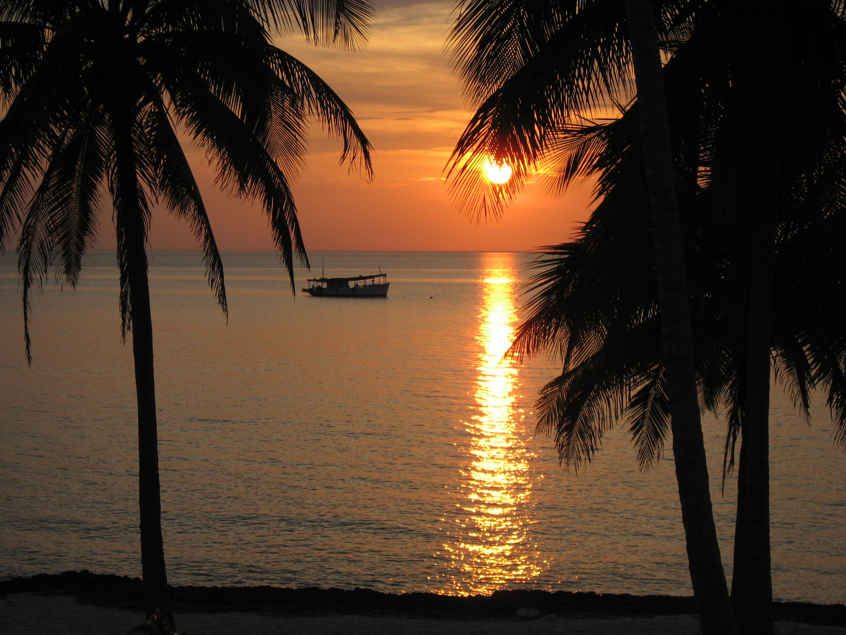 Sunset in Maria la Gorda, Cuba.